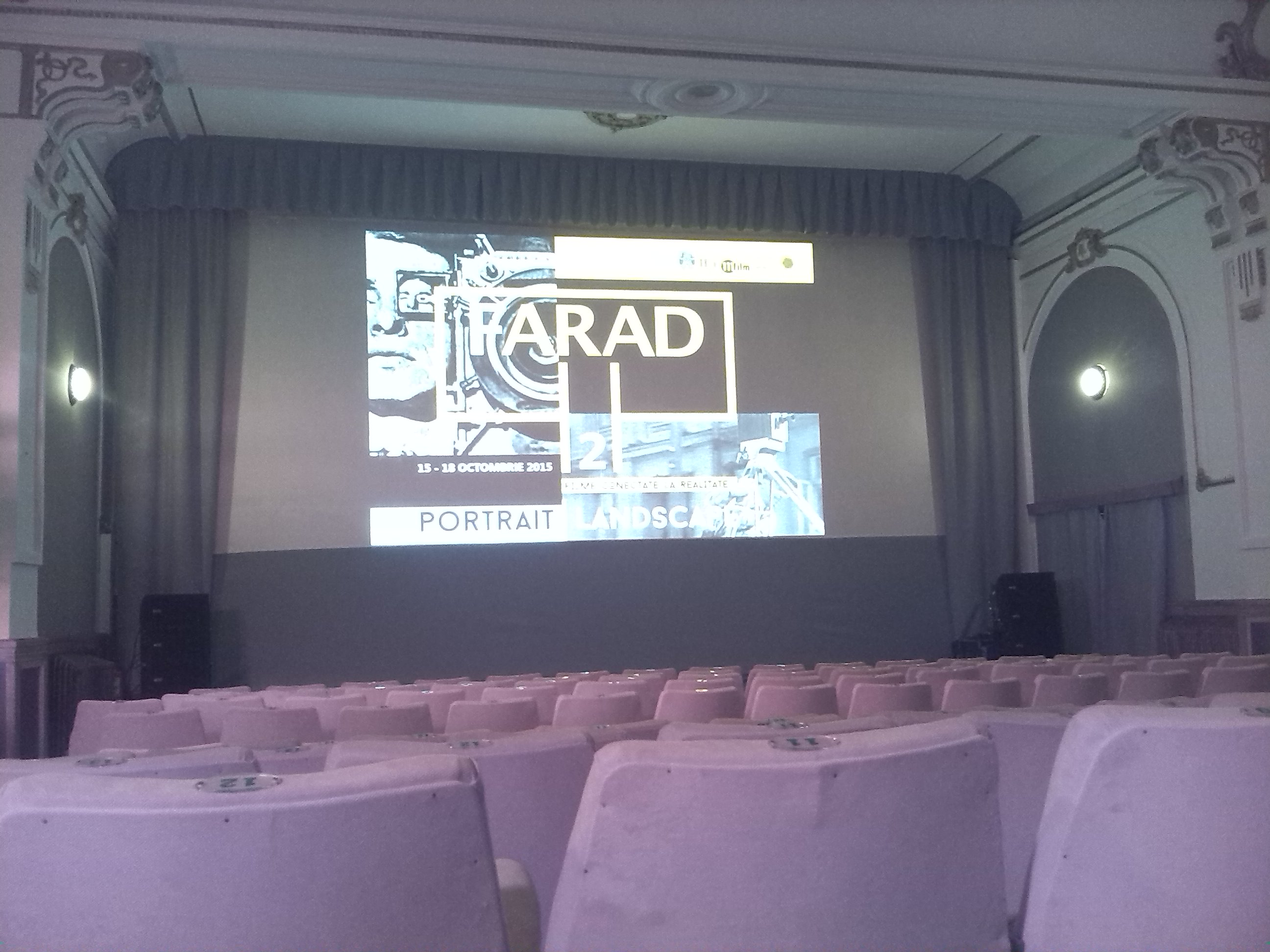 Fotografie din timpul Festivalului de Film Documentar fARAD